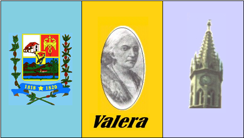 Bandera del municipio Valera, estado Trujillo, Venezuela